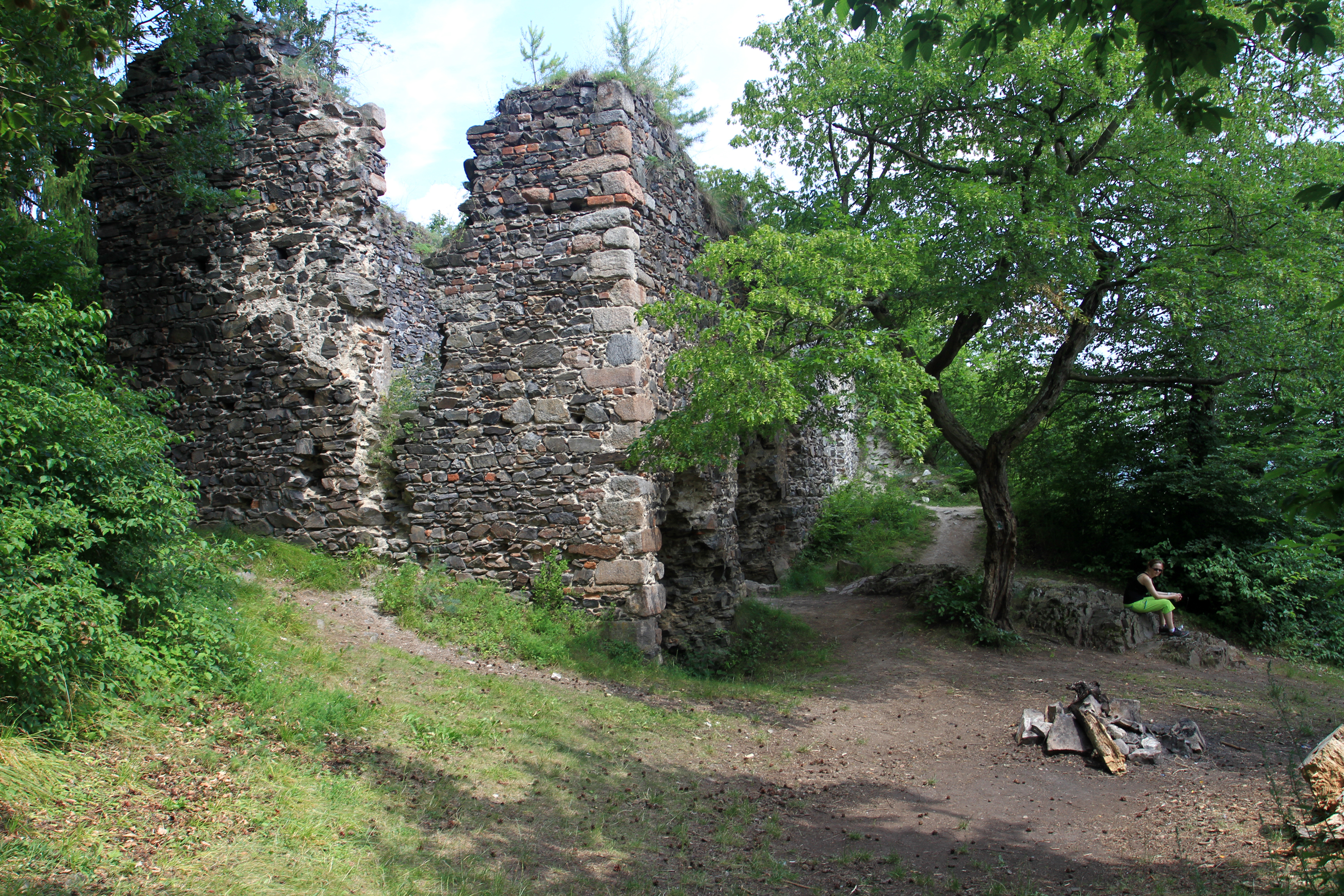 Hrad Zbořený Kostelec, k. ú. Týnec nad Sázavou a k. ú. Čakovice u Řetenic, Zbořený Kostelec